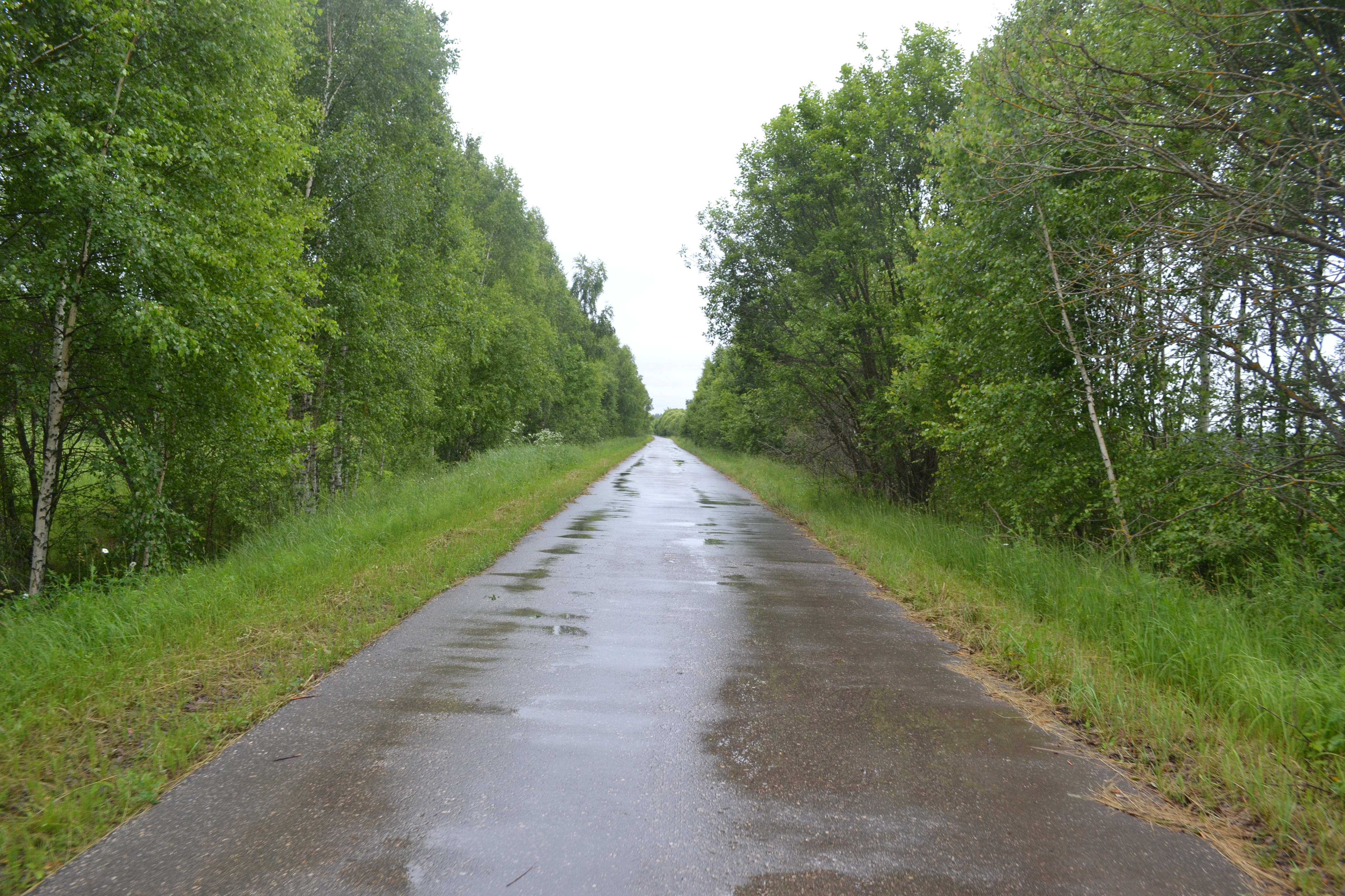 Дорога на Пронино (Шатурский район)